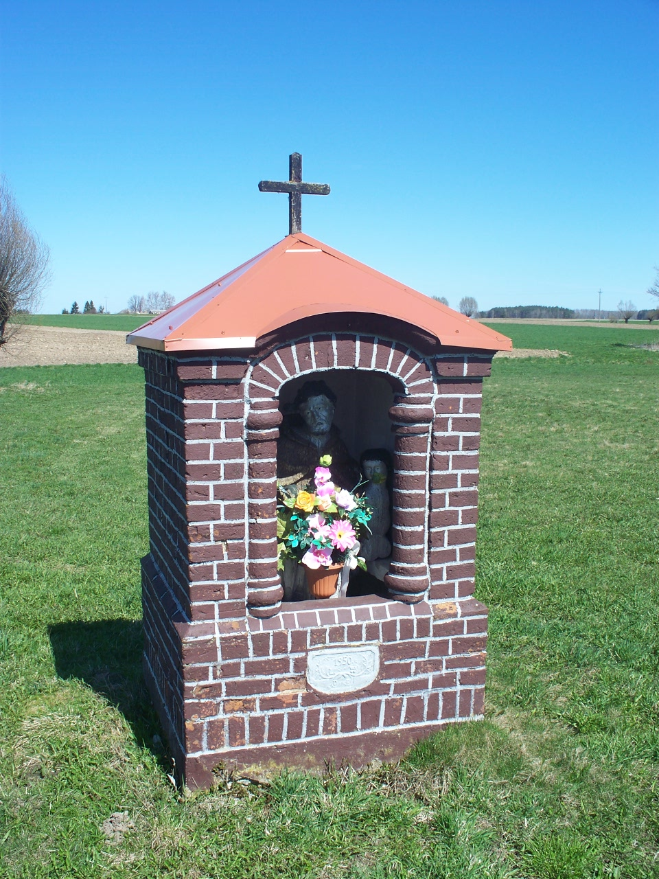 Kapliczka przydrożnaz 1950 roku w której umiszczona jest rzeźba św. Jana Nepomucena z XIX w.